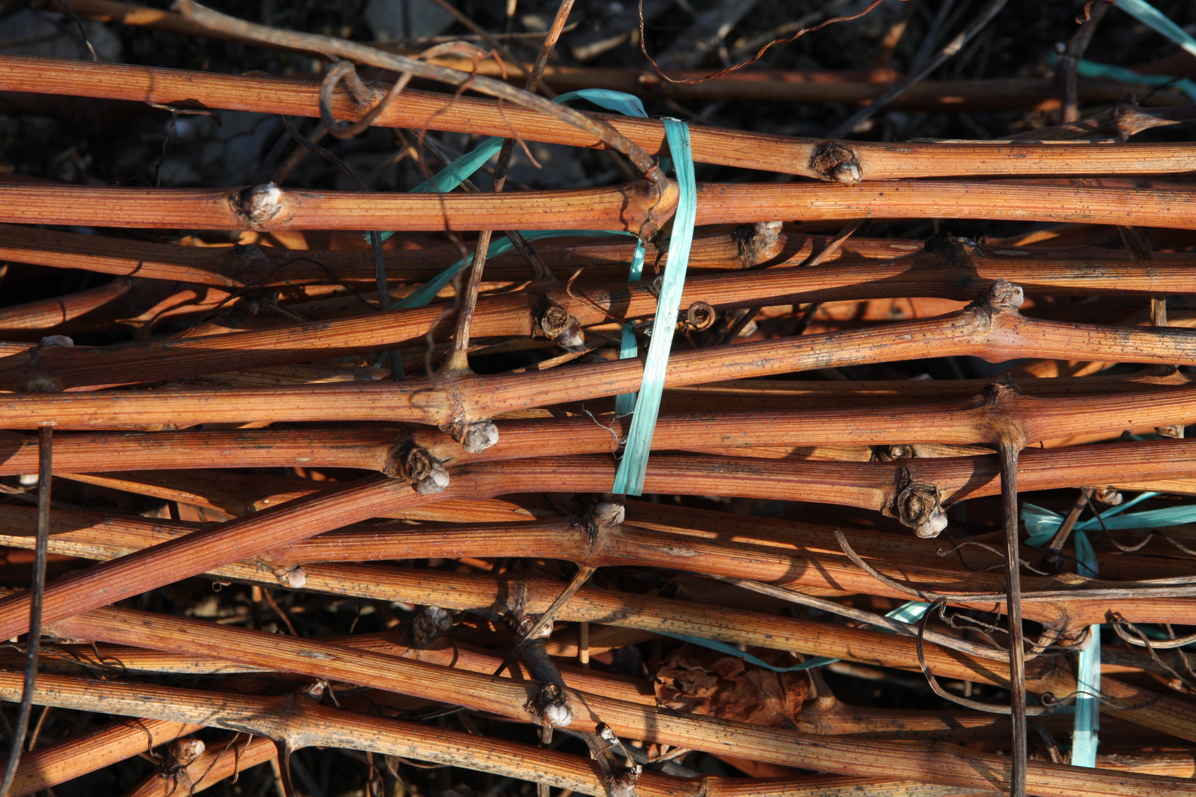 Sarments de vigne